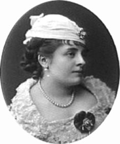 Anna Judic dans La Créole aux Bouffes-Parisiens - 1875 (cliché Nadar).